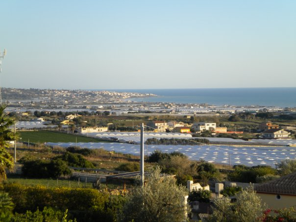 Provincia de Scicli en la isla de Sicilia - Italia 2010